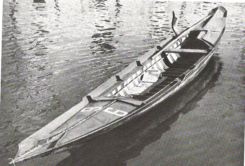 pupparino